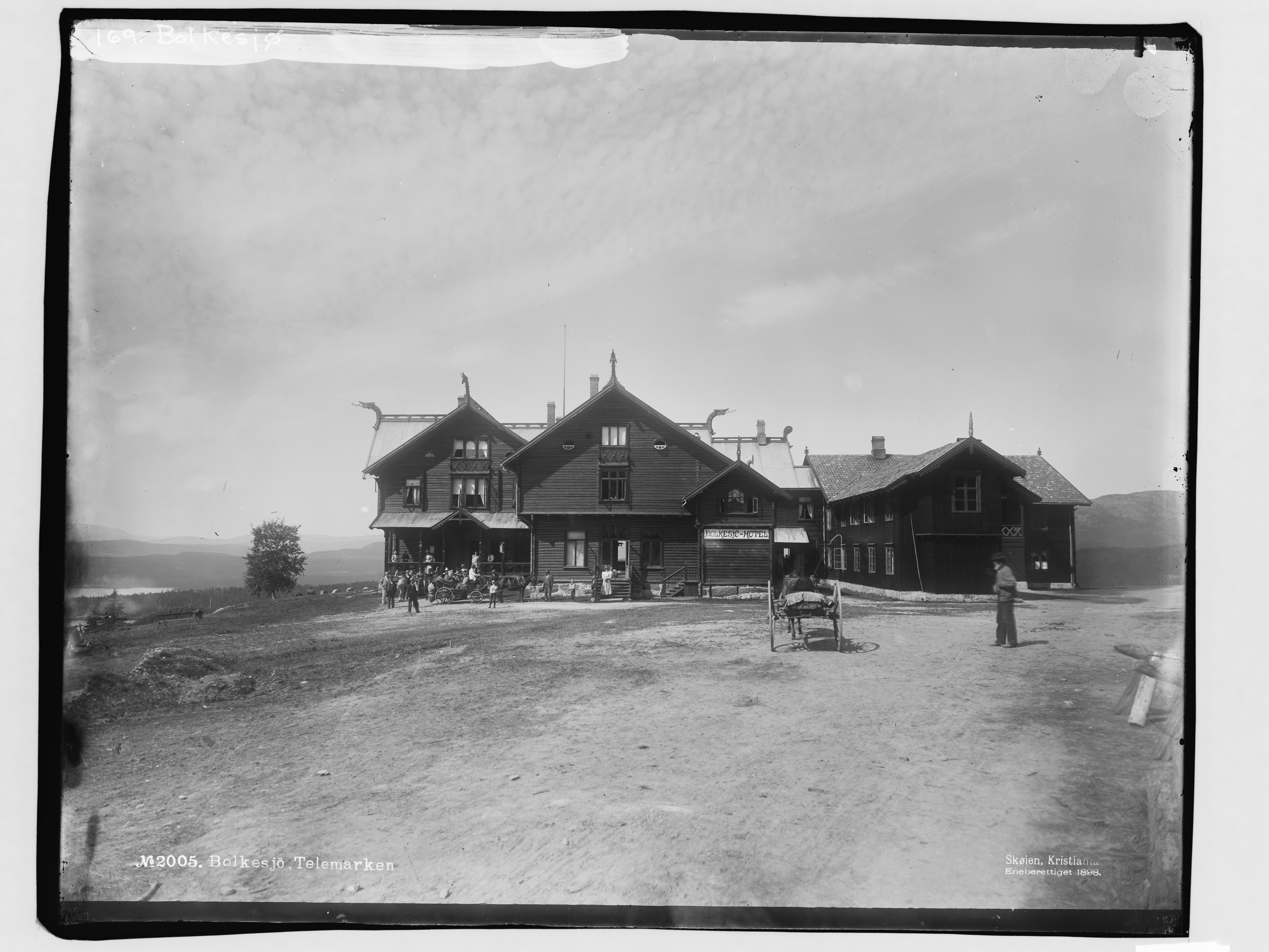 Påskrift negativ: No2005. Bolkesjø. Telemarken. Skøien, Kristiania Eneberettiget 1898 Påskrift negativ: 169 Bolkesjø [Riksantikvaren] Påskrift konvolutt: B-169 Bolkesjø. Bolkesjø Hotel. Eksteriør [Riksantikvaren] [Negativet er eksponert med speilvendt resultat. Rettet opp.] Sted: Bolkesjø Kommune: Notodden Fylke: Telemark Tagger: Bolkesjø hotel hotell fasade